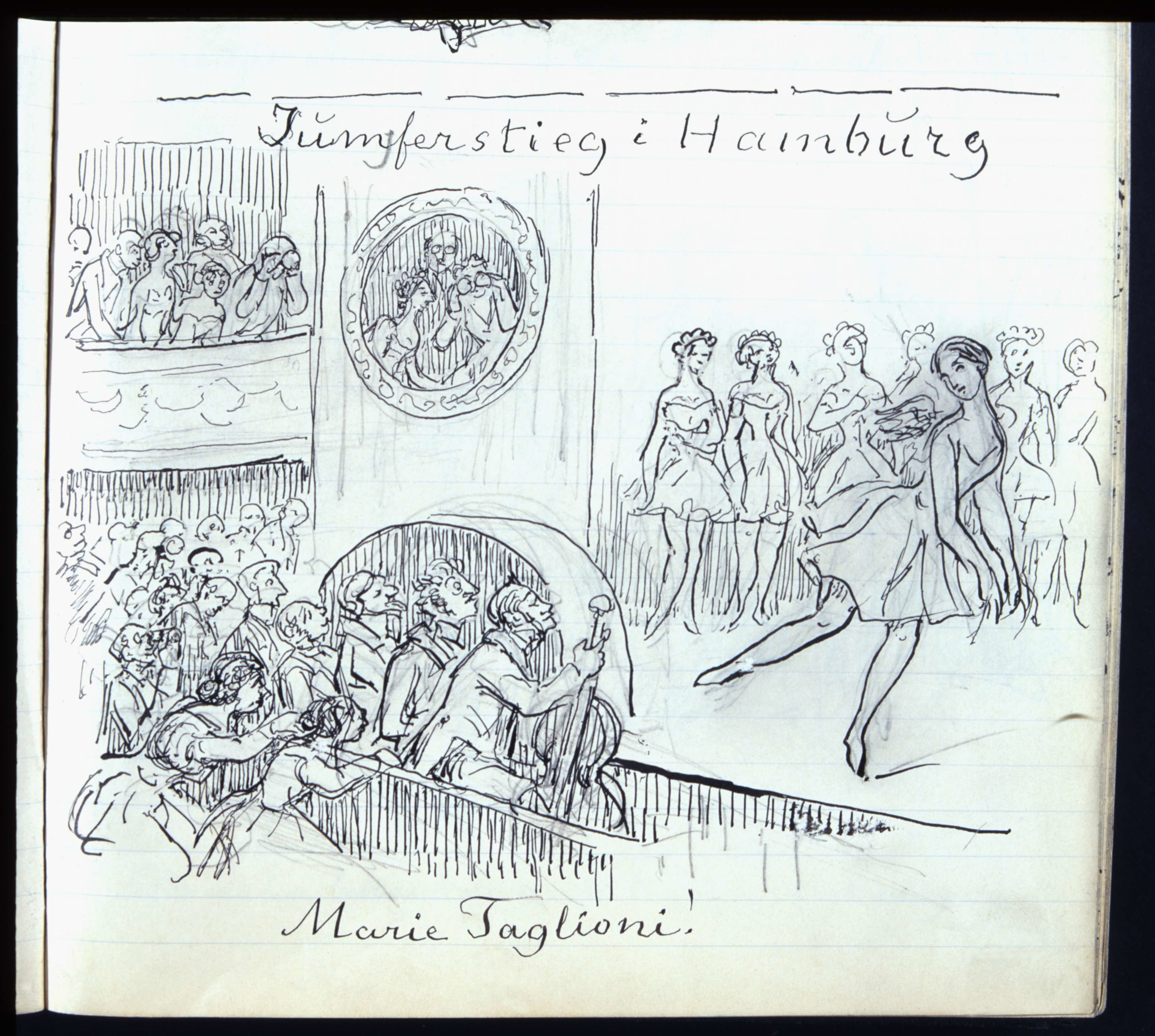 Jungfernstieg i Hamburg. Balettdansösen Marie Taglioni på scen. Tuschteckning av Fritz von Dardel. Nordiska museets arkiv NMA.0037536